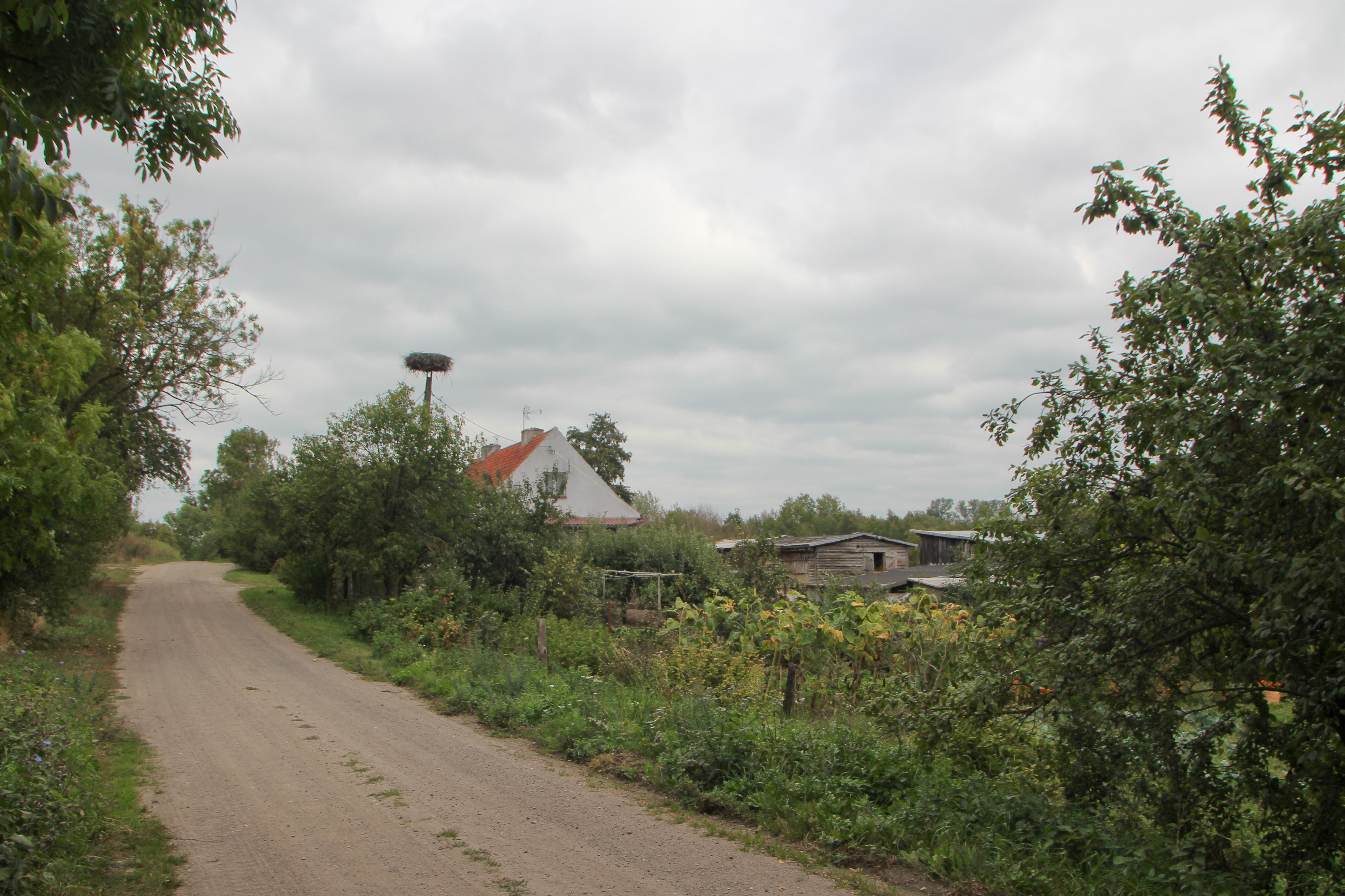 Górki wieś w Polsce w województwie warmińsko-mazurskim, w powiecie kętrzyńskim, w gminie Barciany.